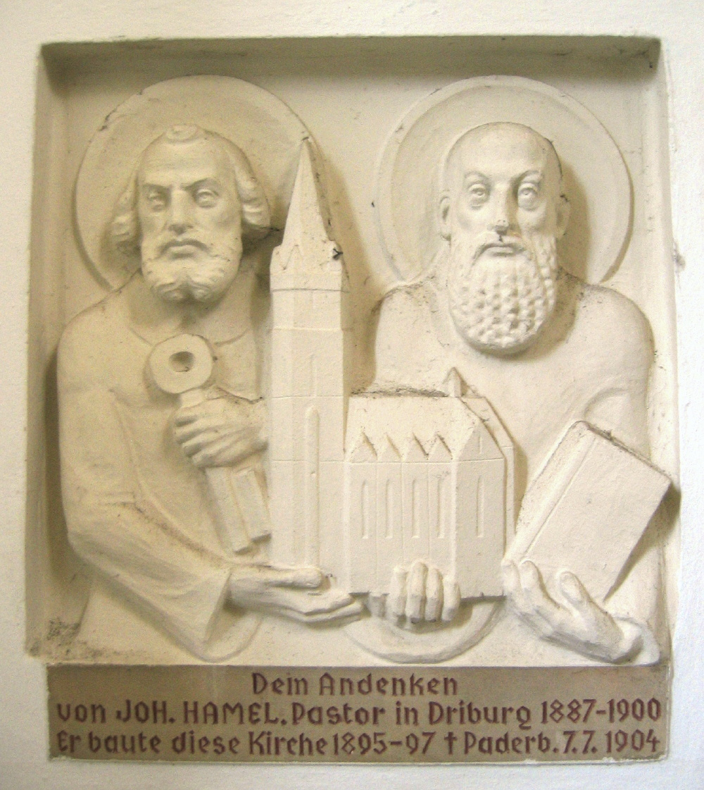 In die Mauer eingelassenes Gedenkrelief in der katholischen Pfarrkirche St. Peter und Paul in der Innenstadt von Bad Driburg, Deutschland. Inschrift: Dem Andenken von JOH. HAMEL. Pastor in Driburg 1887–1900 Er baute diese Kirche 1895–97 † Paderb. 7.7.1904